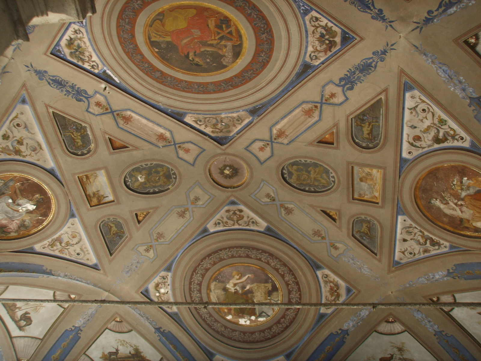 Palazzo_caccini loggetta in Florence